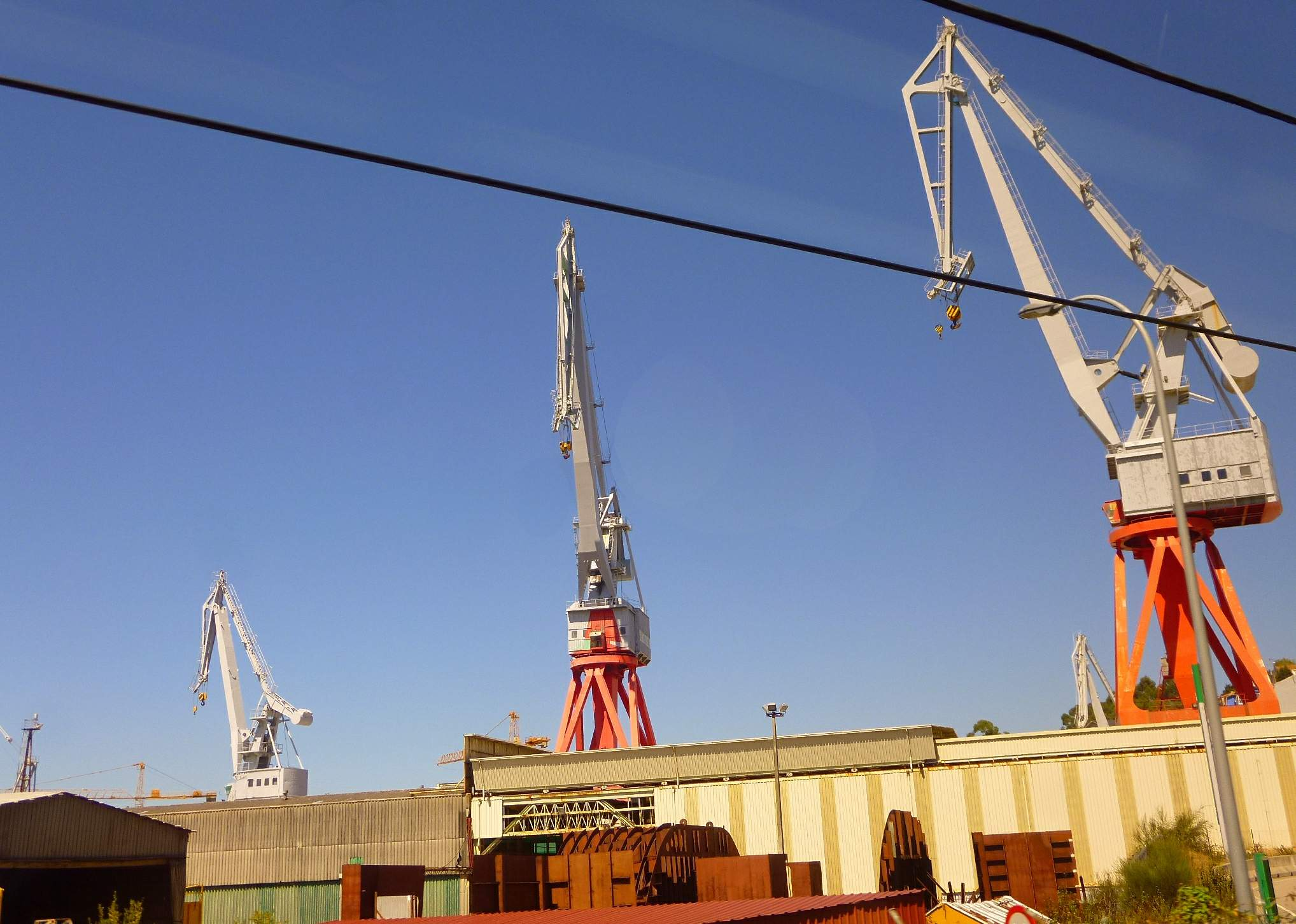 Vigo - Puerto comercial